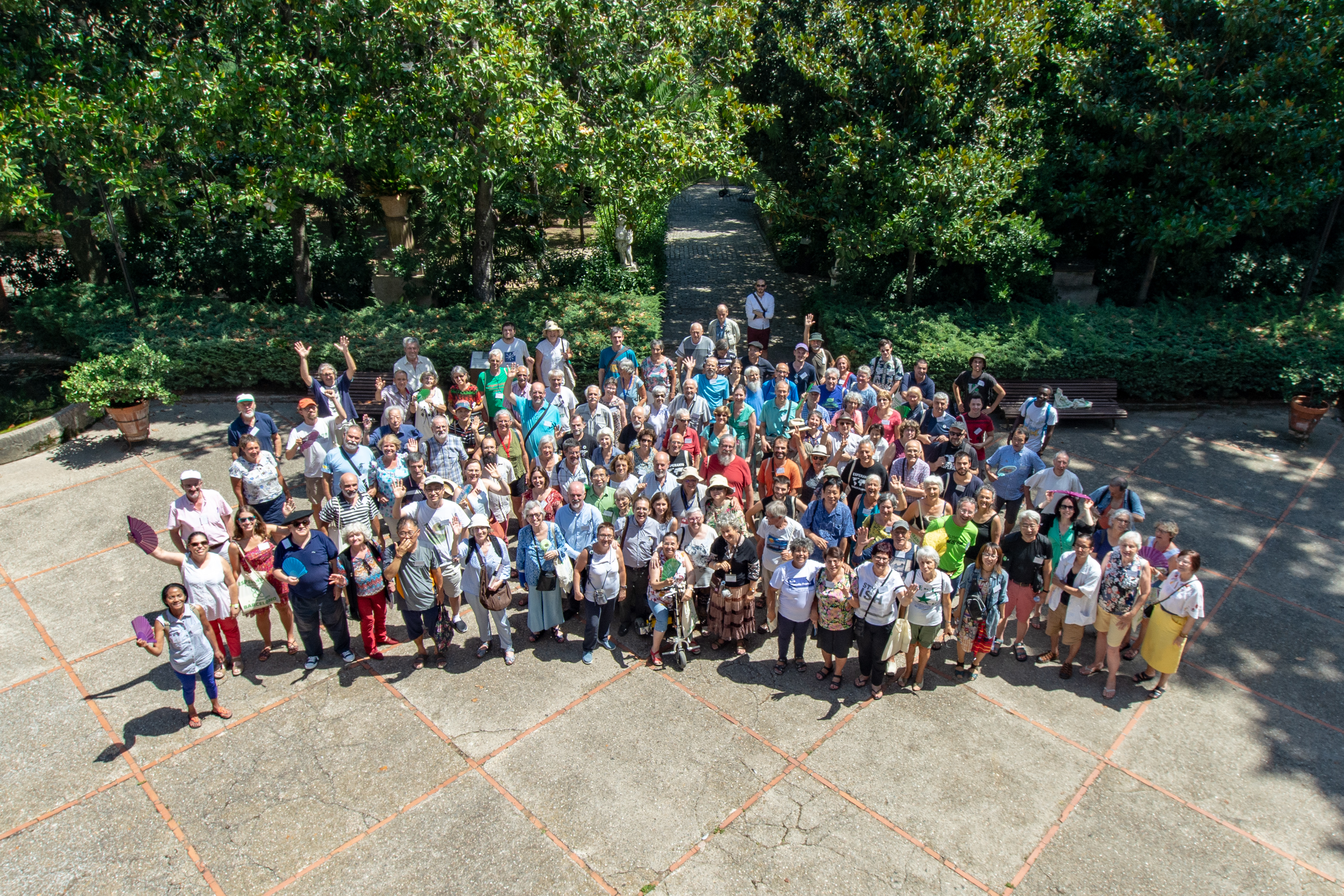 Komuna foto de la partoprenantoj de la 92-a SAT-Kongreso en Barcelono 2019